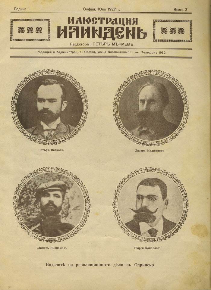 Български Одринските войводи на ТМОРО Deutsch Die Leiter der GMARK in Ostthrakien Македонски Одринските војводи на ТМОРО